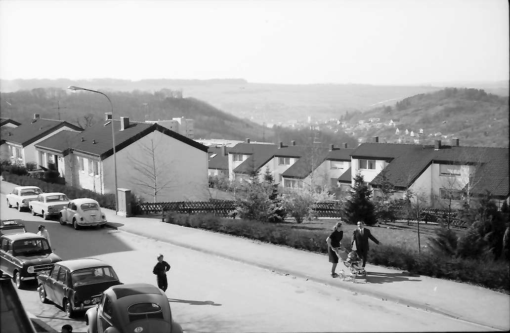 Salzert: Röttelnblickstraße mit Blick auf Lörrach